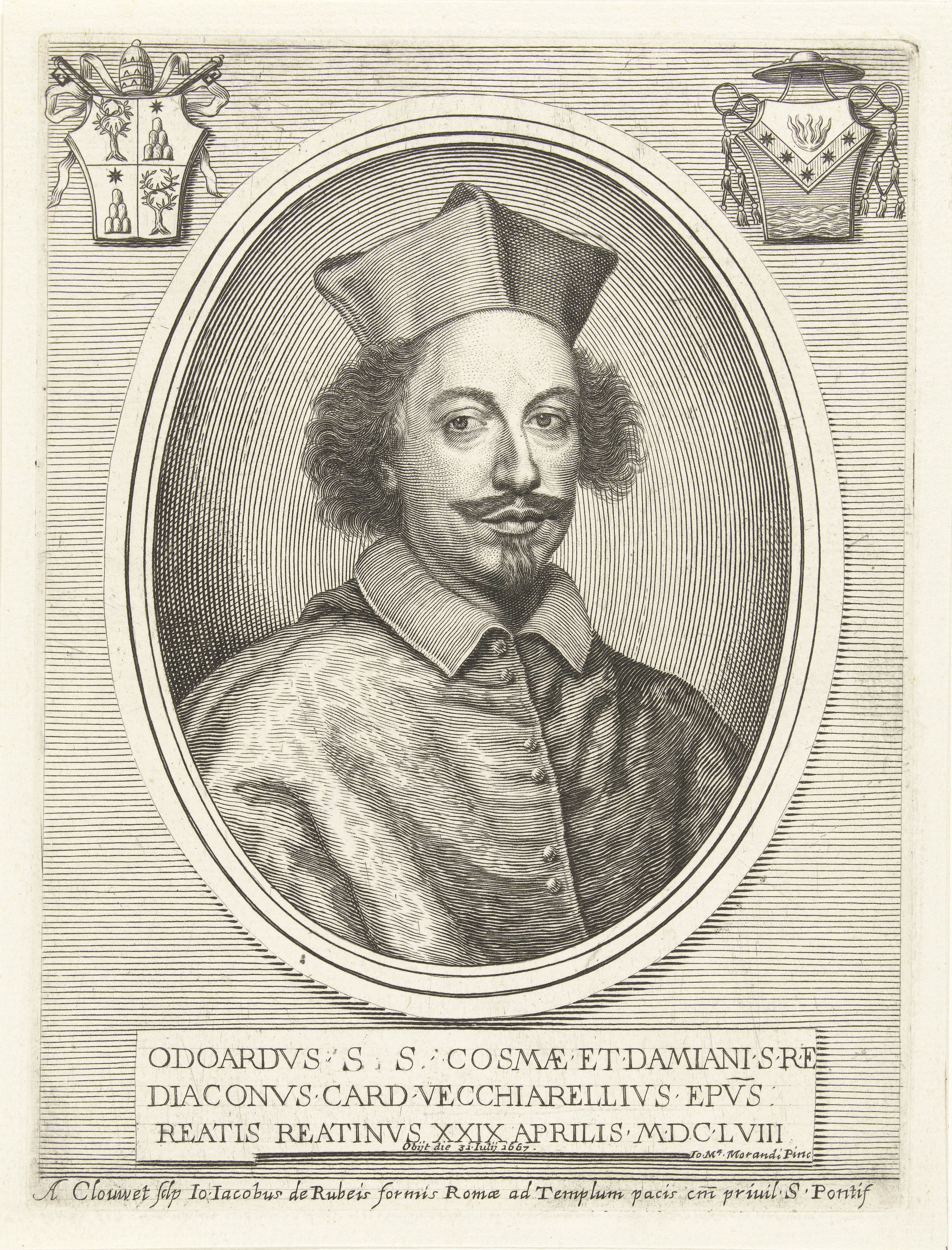 IdentificatieTitel(s): Portret van kardinaal Odoardo VecchiarelliEffigies Cardinalium nunc viventium (serietitel)Objecttype: prent Objectnummer: RP-P-1909-4386Catalogusreferentie: Singer 92497Hollstein Dutch 8Opschriften / Merken: verzamelaarsmerk, verso midden, gestempeld: Lugt 2228Omschrijving: Portret in ovale lijst van kardinaal Odoardo Vecchiarelli. Buste naar licht naar rechts. Bovenaan links het wapen van paus Alexander VII, bovenaan rechts het wapen van kardinaal Odoardo Vecchiarelli. De prent heeft een Latijns onderschrift met gegevens over de geportretteerde.VervaardigingVervaardiger: prentmaker: Albertus Clouwet (vermeld op object)naar schilderij van: Giovanni Maria Morandi (vermeld op object)uitgever: Giovanni Giacomo de'Rossi (vermeld op object)Plaats vervaardiging: RomeDatering: 1667 - 1679Fysieke kenmerken: gravureMateriaal: papier Techniek: graveren (drukprocedé)Afmetingen: plaatrand: h 192 mm × b 145 mmToelichtingdeel van een serie met als titel "Effigies Cardinalium nunc viventum". De serie bestaat uit portretten van kardinalen.OnderwerpWie: Odoardo VecchiarelliVerwerving en rechtenVerwerving: aankoop 1905Copyright: Publiek domein